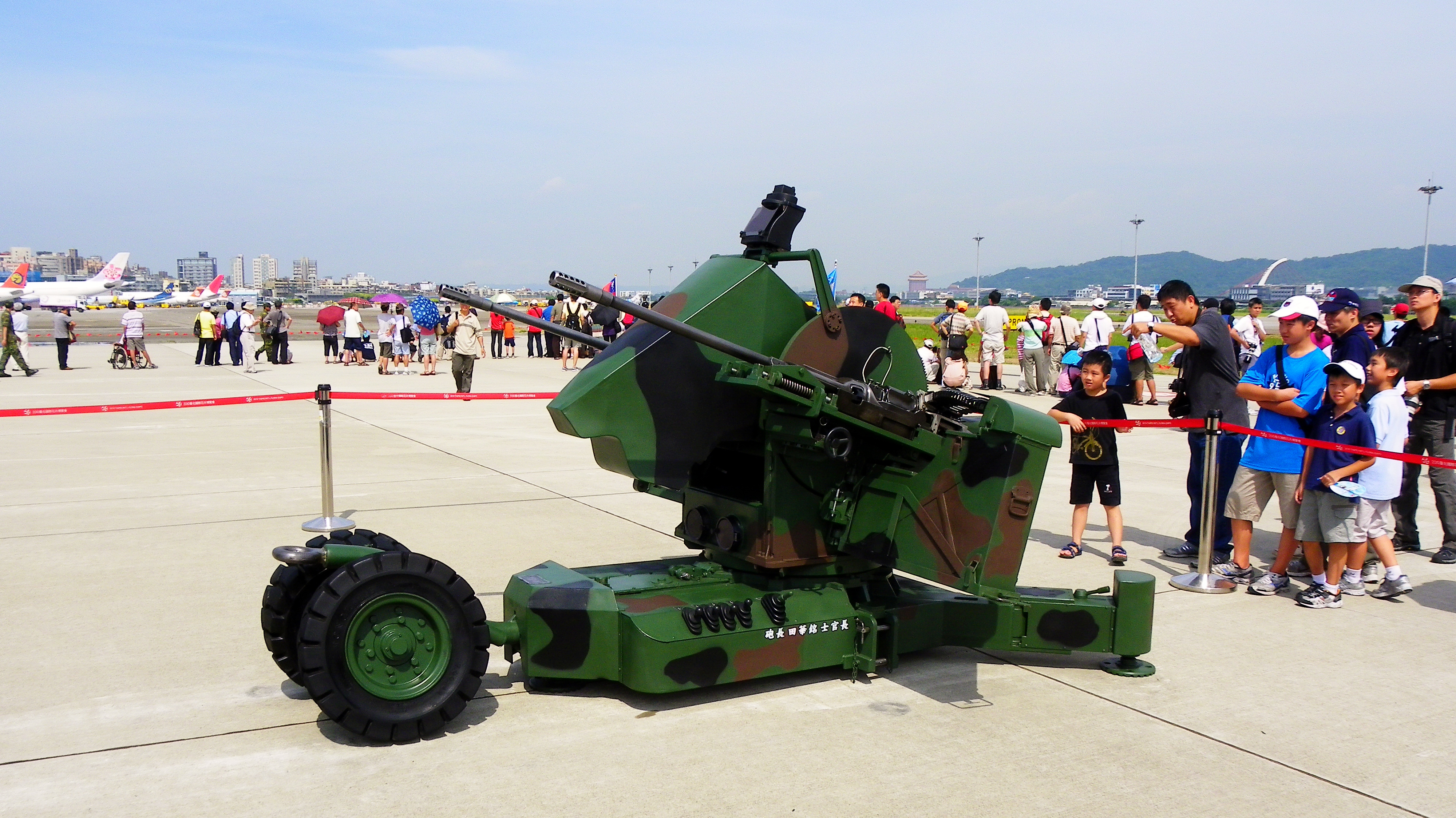 聯勤205兵工廠T-82T機動式20mm聯裝高射機關砲，攝於2011年8月13日空軍松山基地營區公開活動。